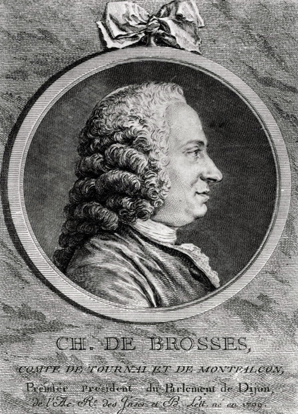 Portrait of Charles de Brosses (1709-1777), comte de Tournai et de Montfaucon